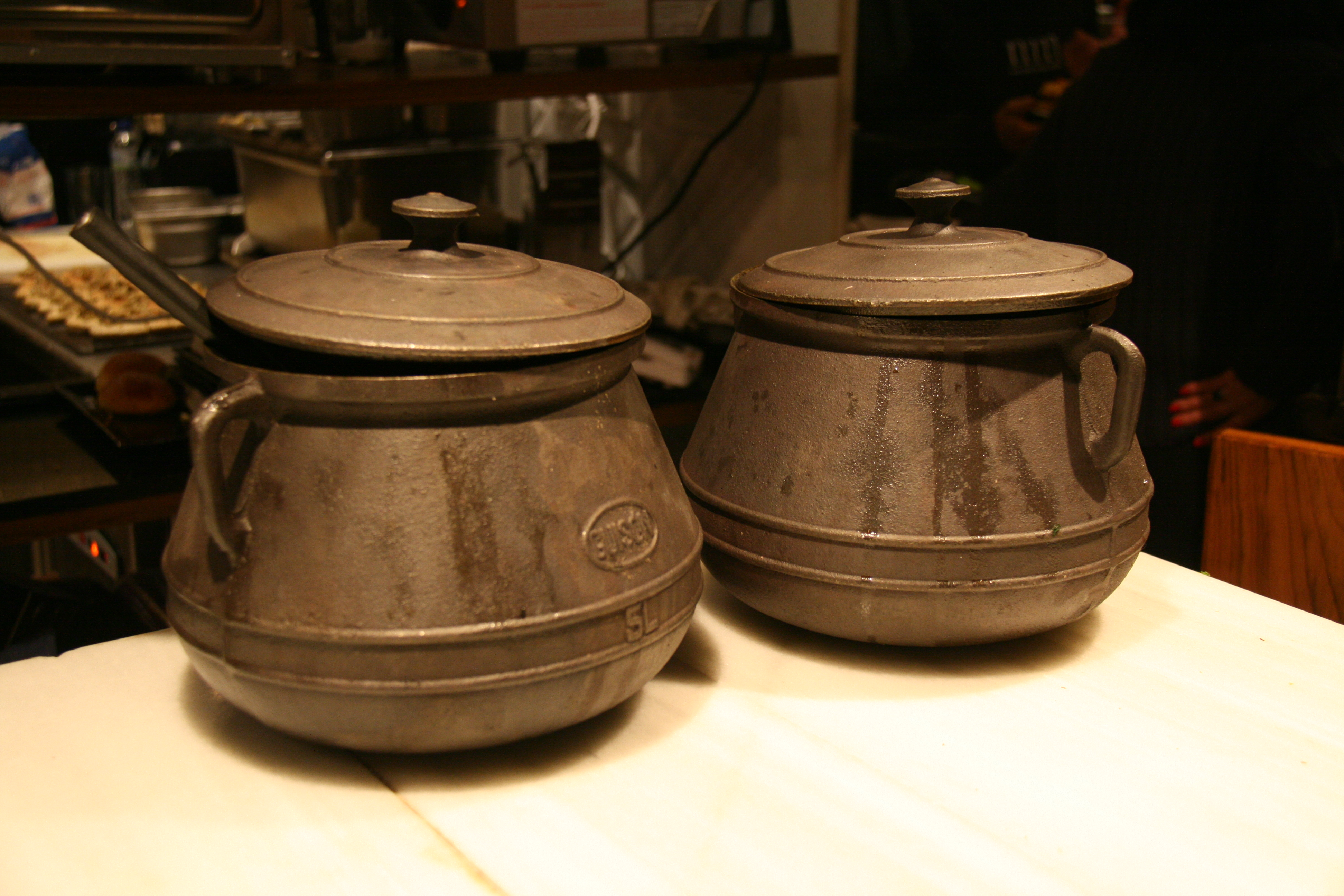 Ollas de hierro